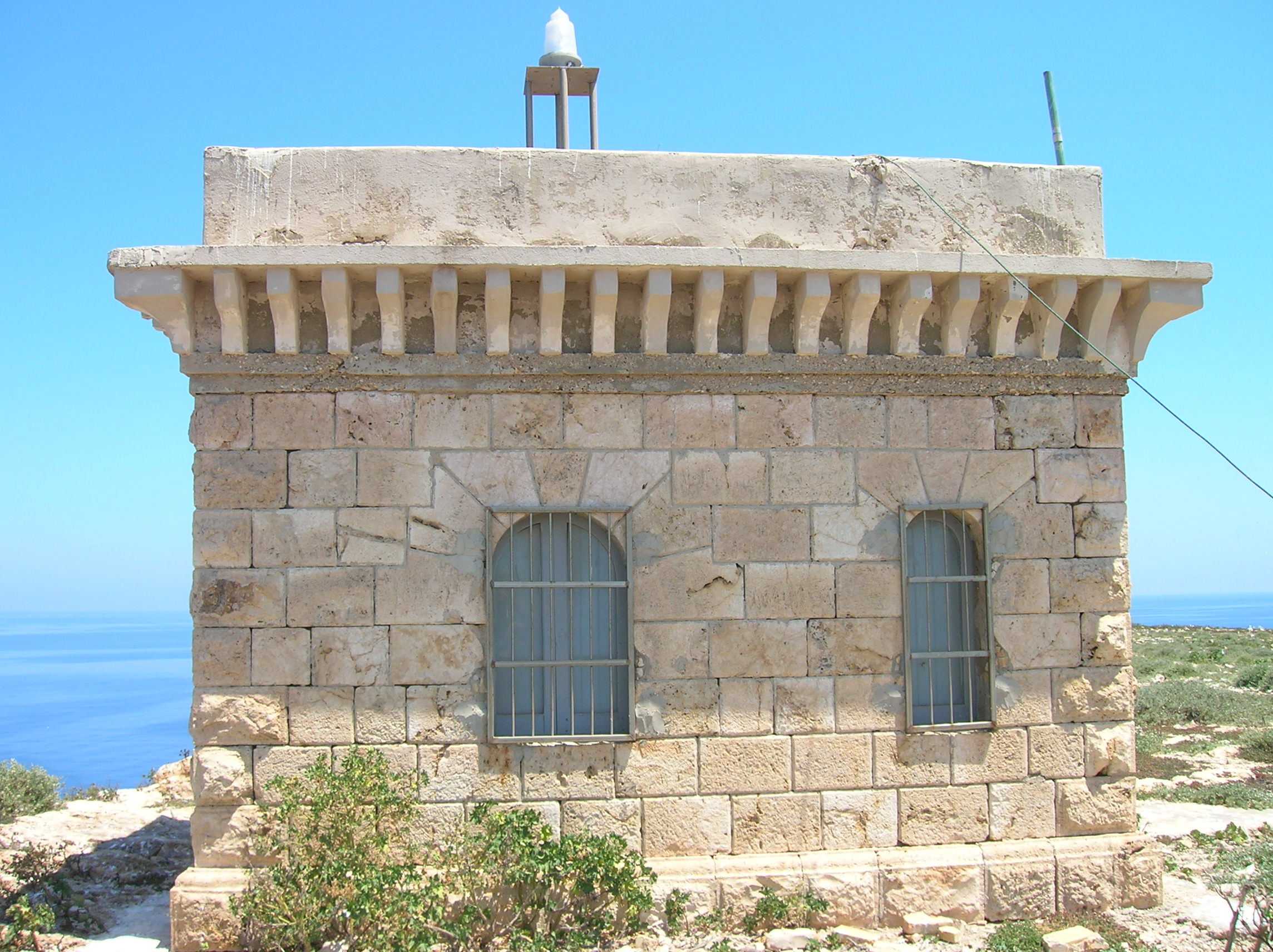 Isola di Lampione